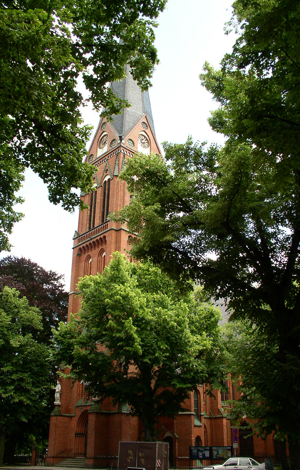 Die Erlöserkirche in Potsdam, erbaut 1896 bis 1898.